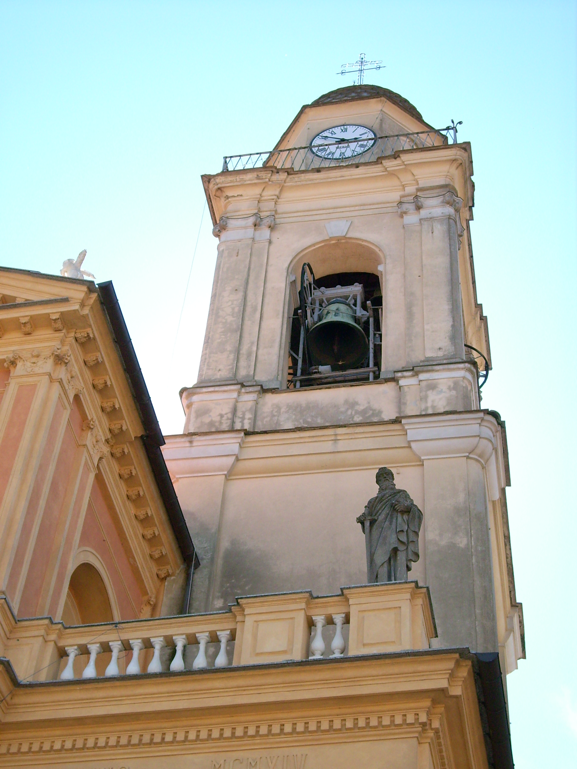 Chiesa di san Giorgio di Busalla, Liguria, Italia